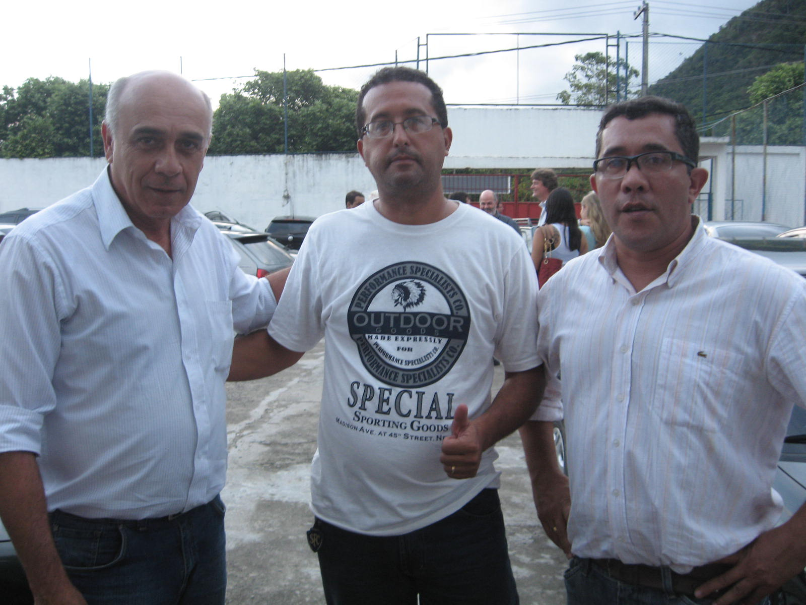 Dirigentes do Serrano. Carlos Alberto Lancetta, Alexandre Beck e Paulo Catrambi.